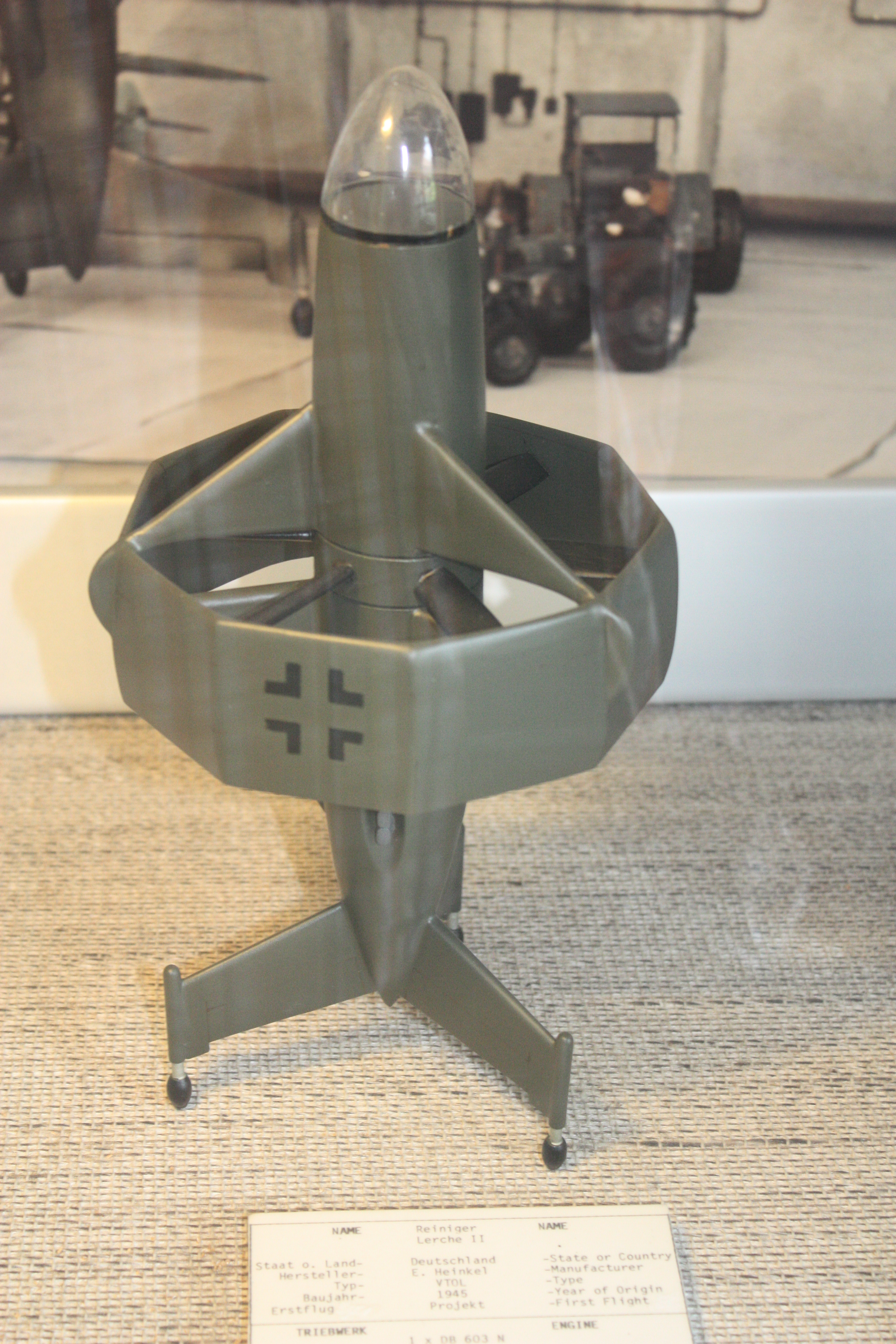 Hubschraubermuseum Bückeburg